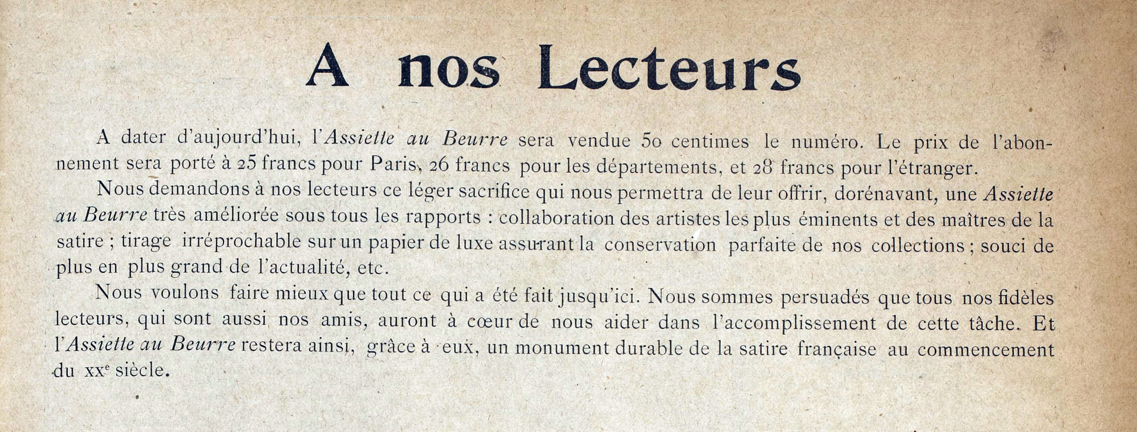 Avis aux lecteurs. Texte A dater d'aujourd'hui, l'Assiette au Beurre sera vendue 50 centimes le numéro. Le prix de l'abonnement sera porté à 25 francs pour Paris, 26 francs pour les départements, et 28 francs pour l'étranger. Nous demandons à nos lecteurs ce léger sacrifice qui nous permettra de leur offrir, dorénavant, une Assiette au Beurre très améliorée sous tous les rapports : collaboration des artistes les plus éminents et des maîtres de la satire ; tirage irréprochable sur un papier de luxe assurant la conservation parfaite de nos collections ; souci de plus en plus grand de l'actualité, etc. Nous voulons faire mieux que tout ce qui a été fait jusqu'ici. Nous sommes persuadés que tous nos fidèles lecteurs, qui sont aussi nos amis, auront à cœur de nous aider dans l'accomplissement de cette tâche. Et l'Assiette au Beurre restera ainsi, grâce à eux, un monument durable de la satire française au commencement du XXe siècle.